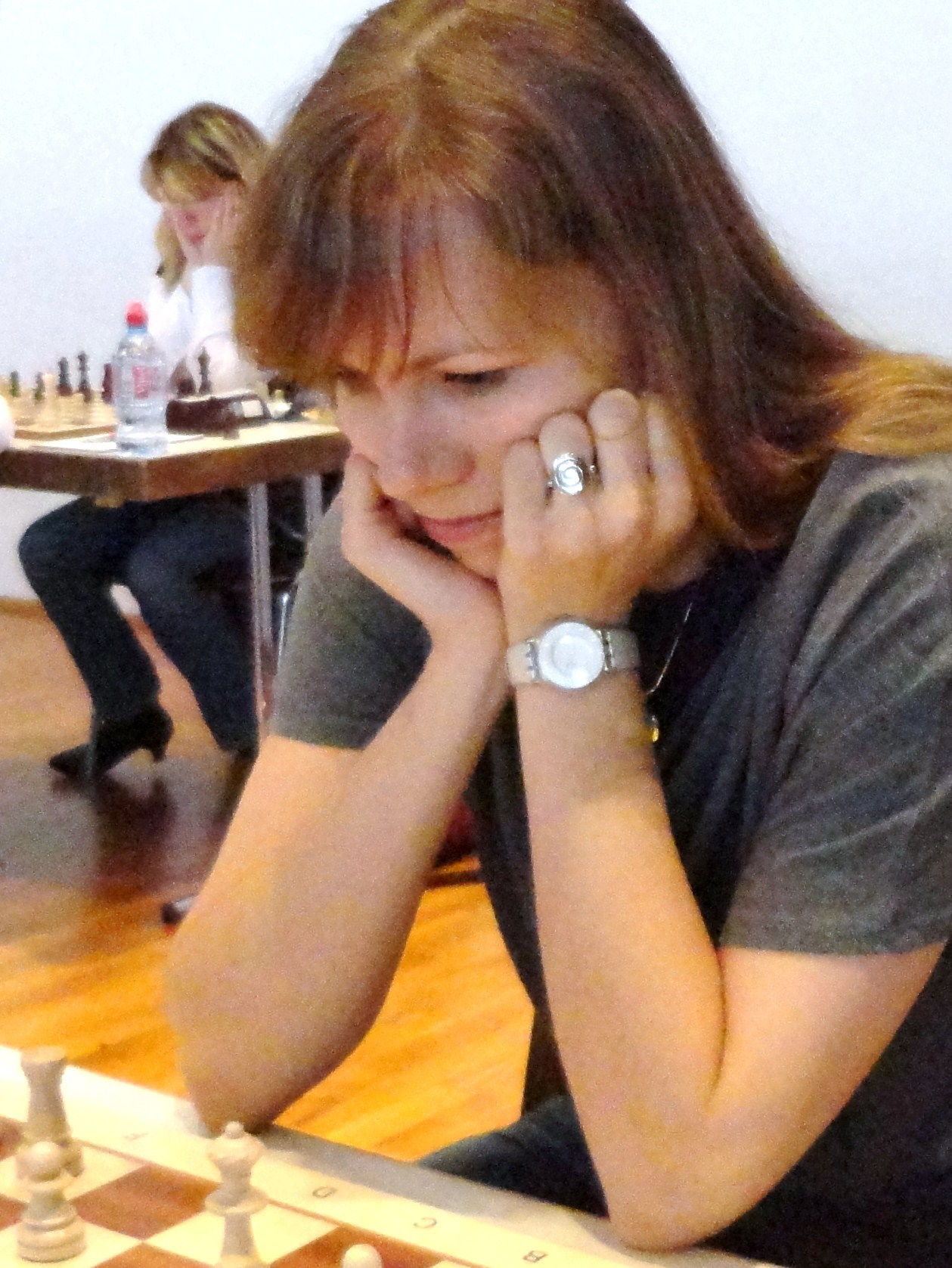 Olga Girya, Finalrunden der Schachbundesliga der Frauen, Saison 2011/12 in Gladenbach.